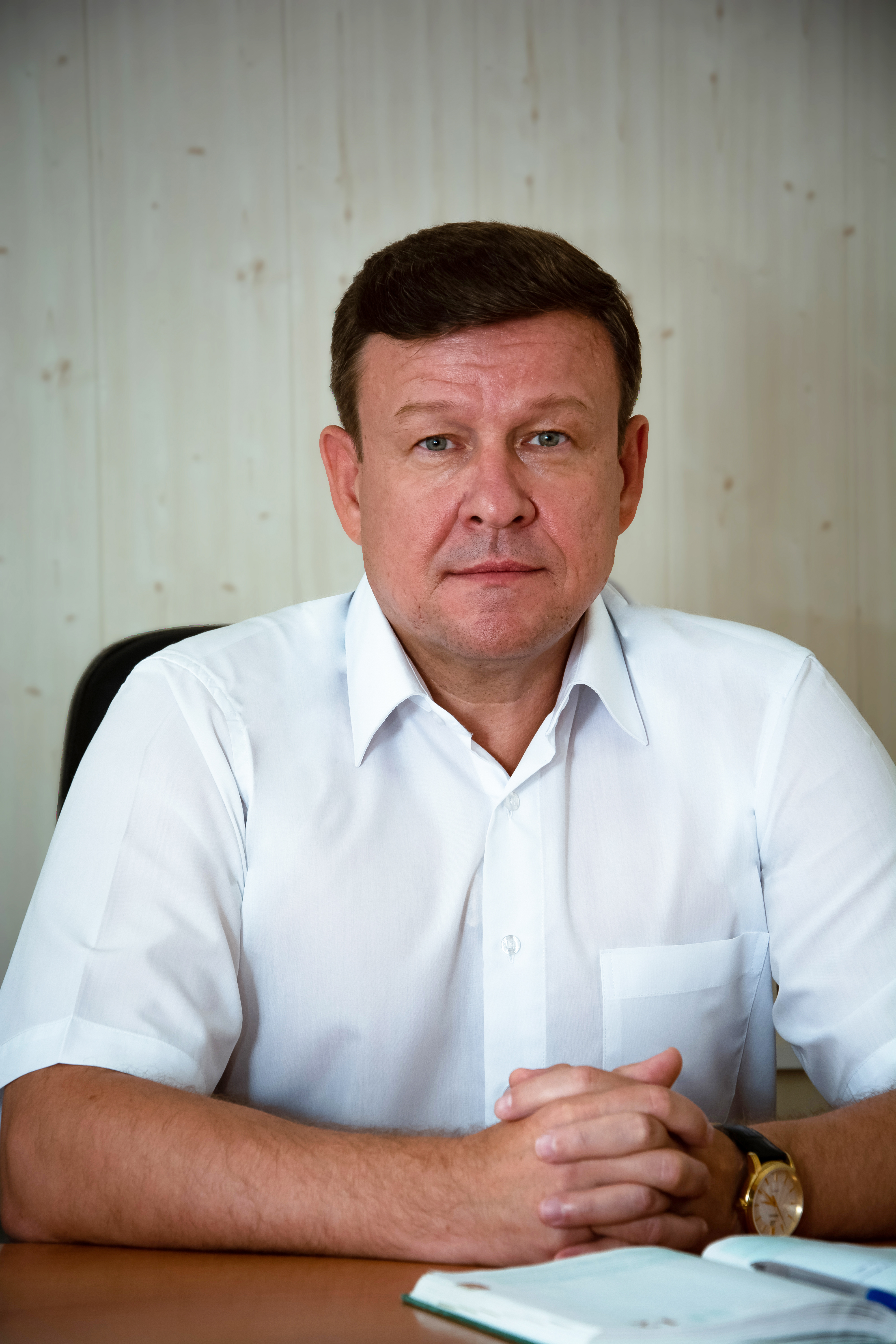 Председатель совета ЗАТО Межгорье